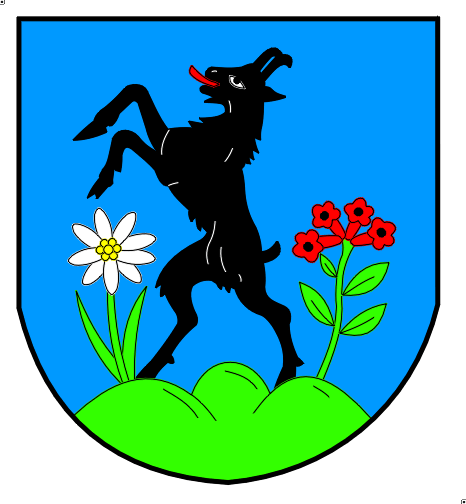 Wappen von Bitsch Kanton Wallis Schweiz